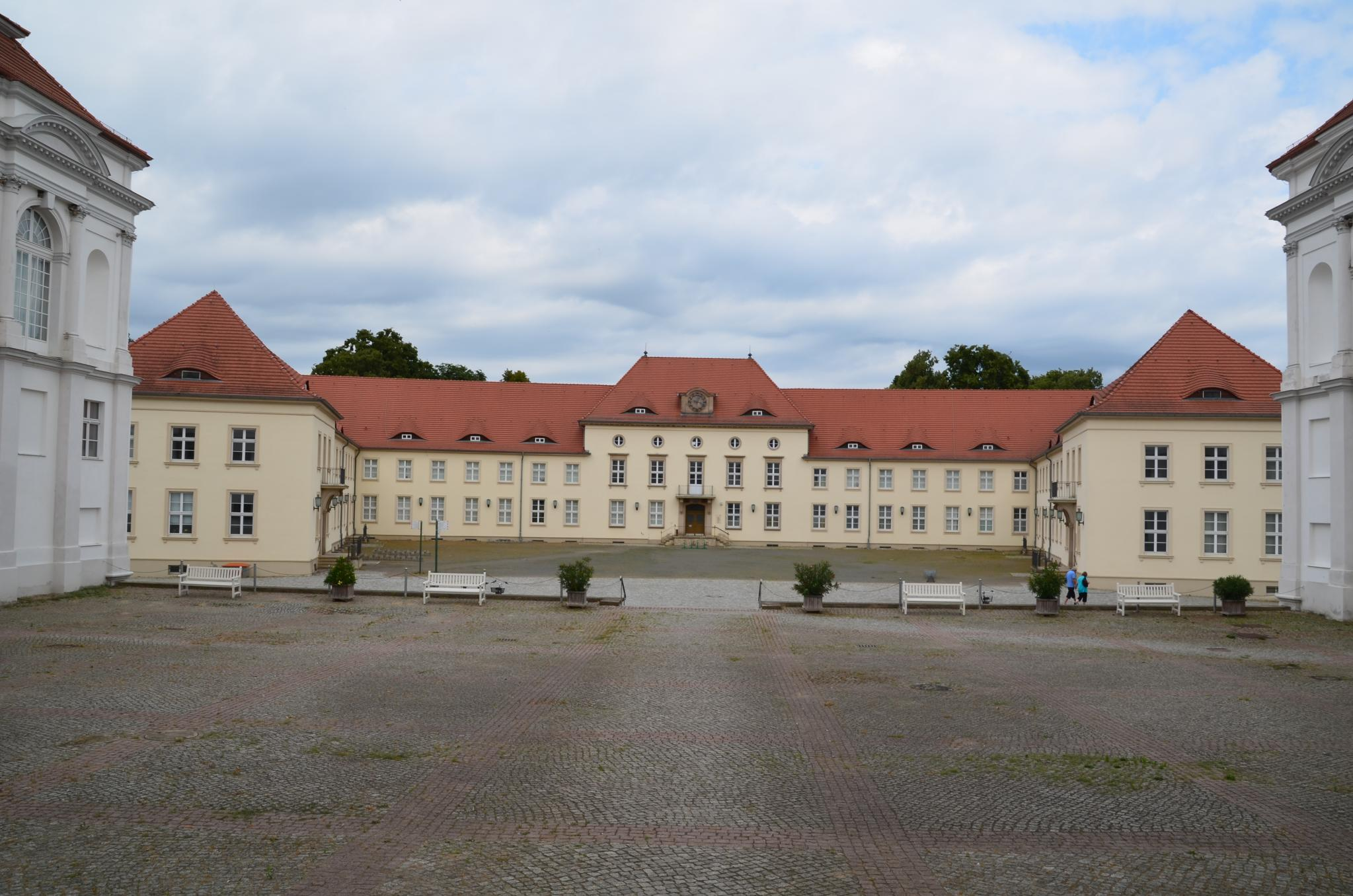 Oranienburg Impressionen